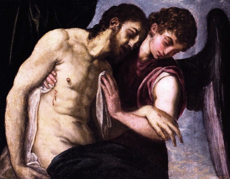 Tintoretto - Cristo morto sorretto da un angelo olio su tela - 67 x 85 cm Galleria Nazionale di Arte Antica, Trieste